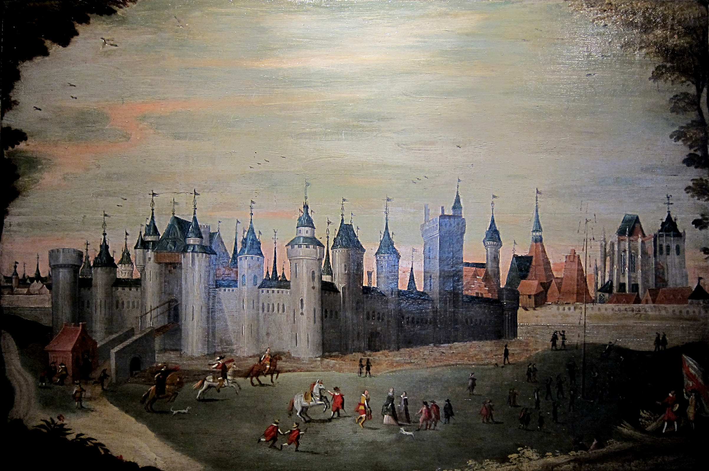 Le château de Courtrai à Lille (Musée de L'hospice Comtesse). Construit sur ordre de Philippe le Bel sur la rive droite de la basse Deûle en 1299, il a été complétement détruit au début du XVIIème siècle.